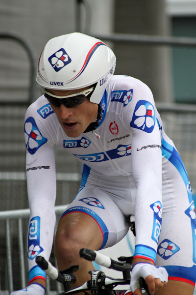 Prologue du Critérium du Dauphiné 2011, Saint Jean de Maurienne